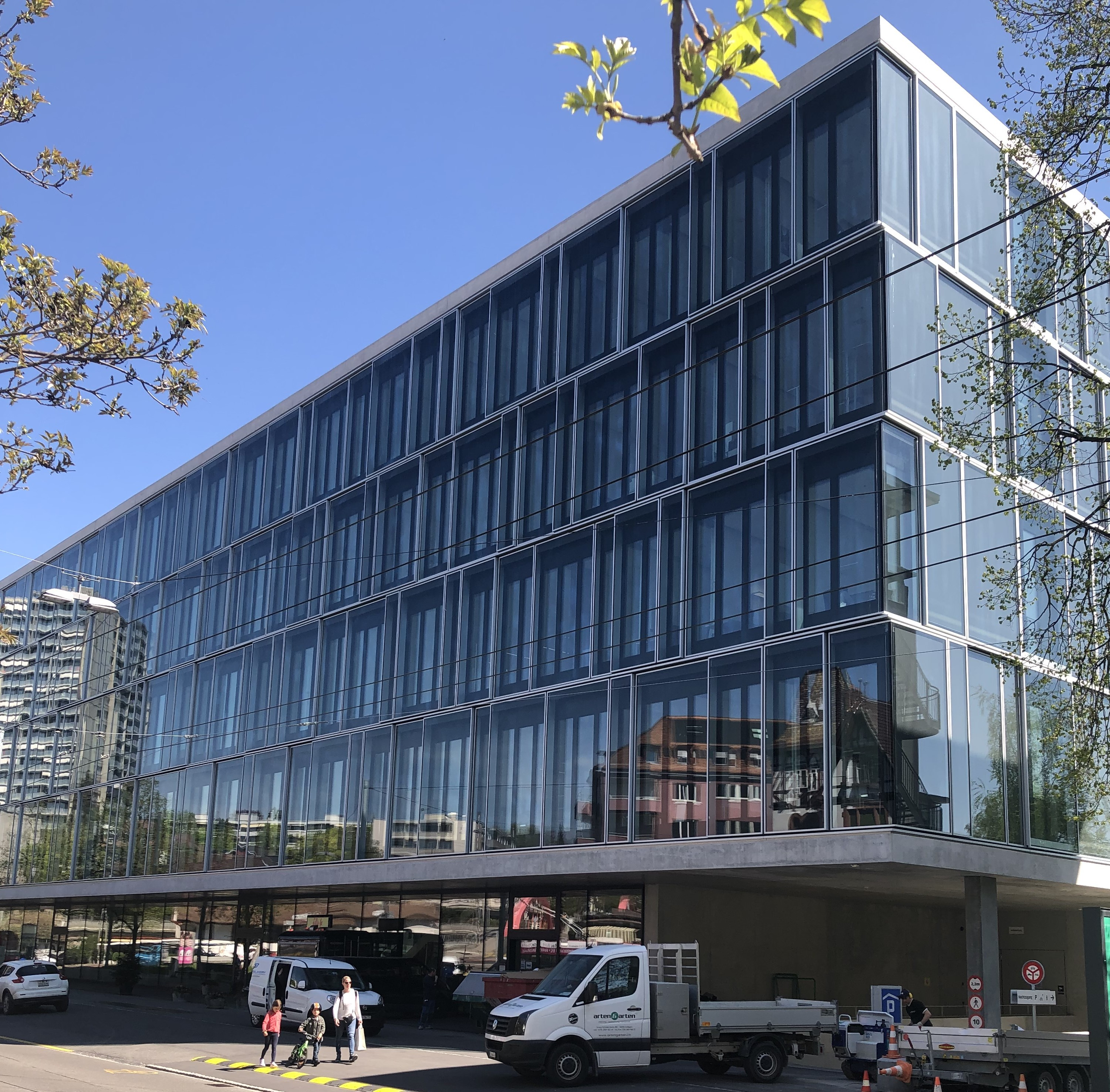 Inselspital Nationales Kompetenzzentrum für Translationale Medizin